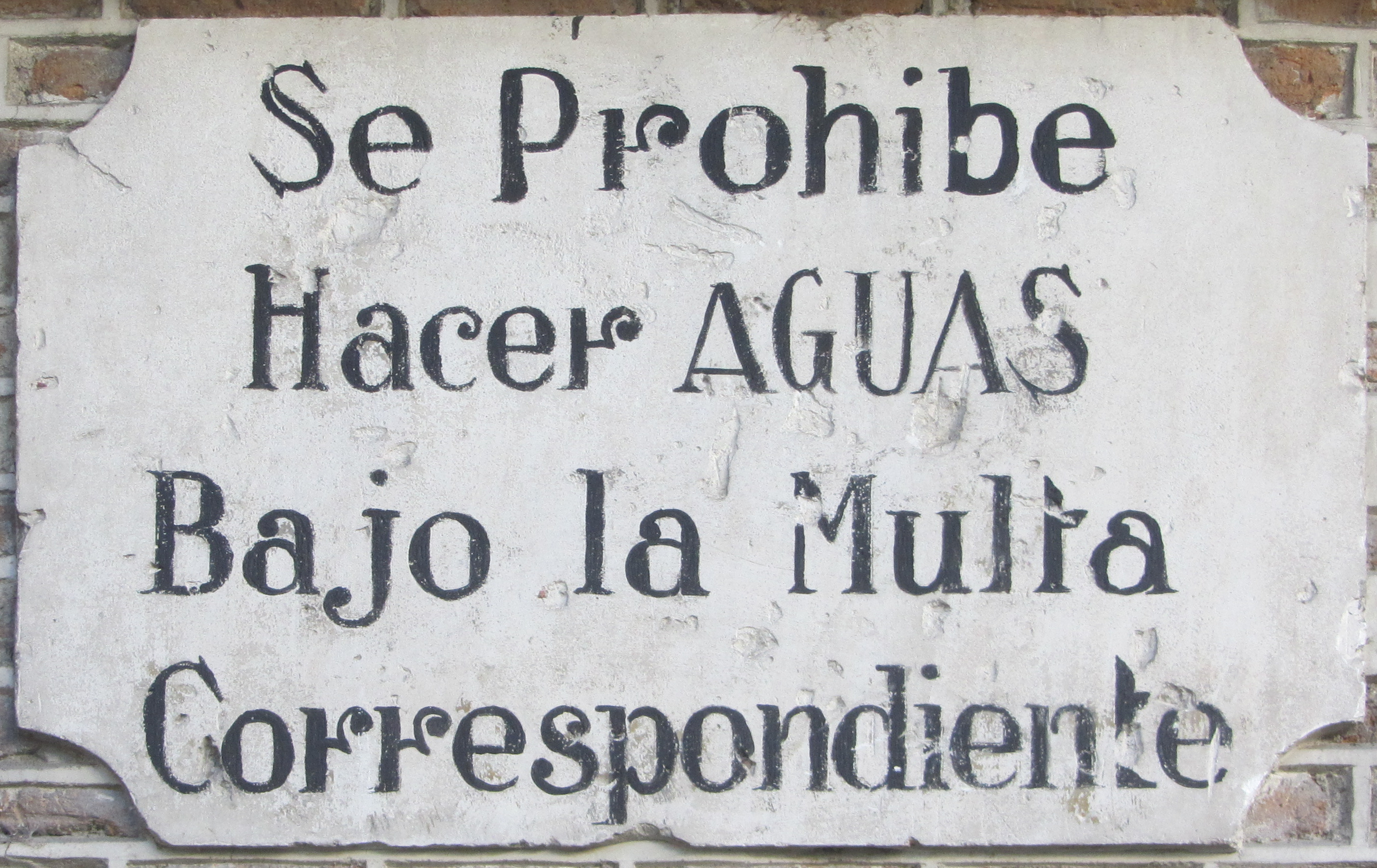 Lápida en la plaza de la Encarnación de Madrid, prohibiendo orinar en la vía pública como medida de higiene pública.